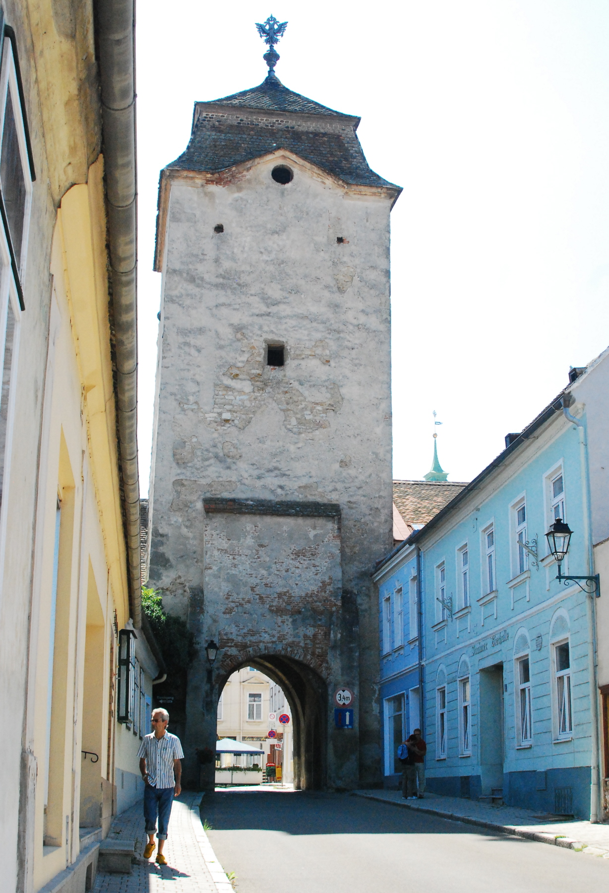 Der Znaimerturm mit einem der Stadttore der Stadt Retz in Niederösterreich